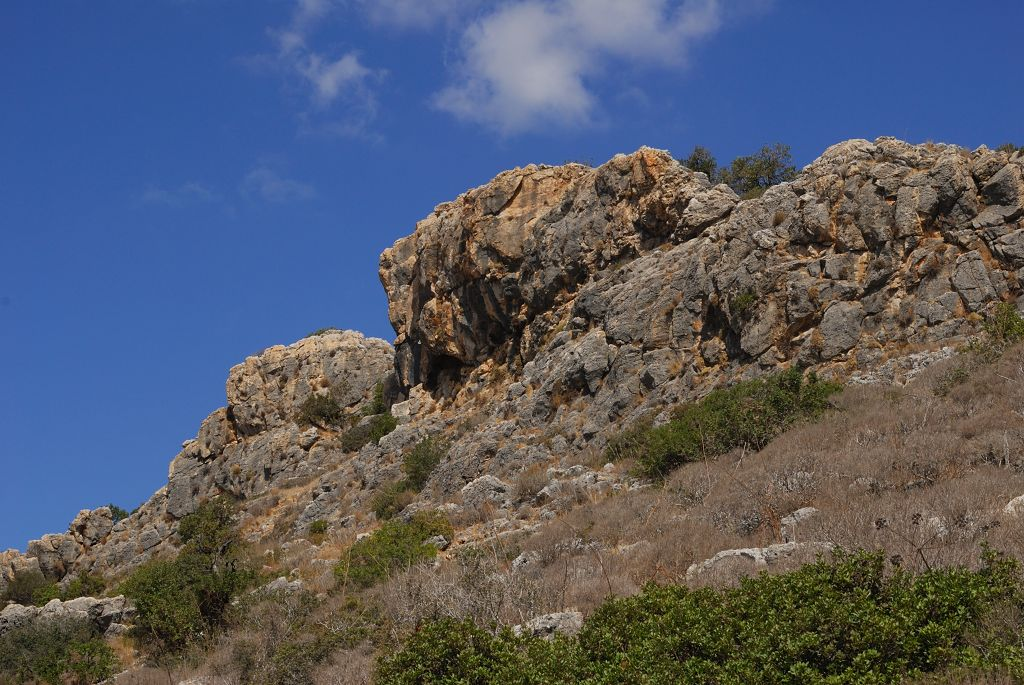 שוניות בנחל מערות